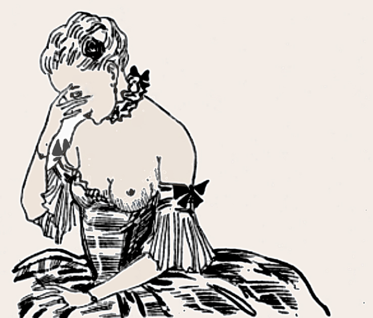 illustration d'une nouvelle de Gaston Derys d'aout 1927